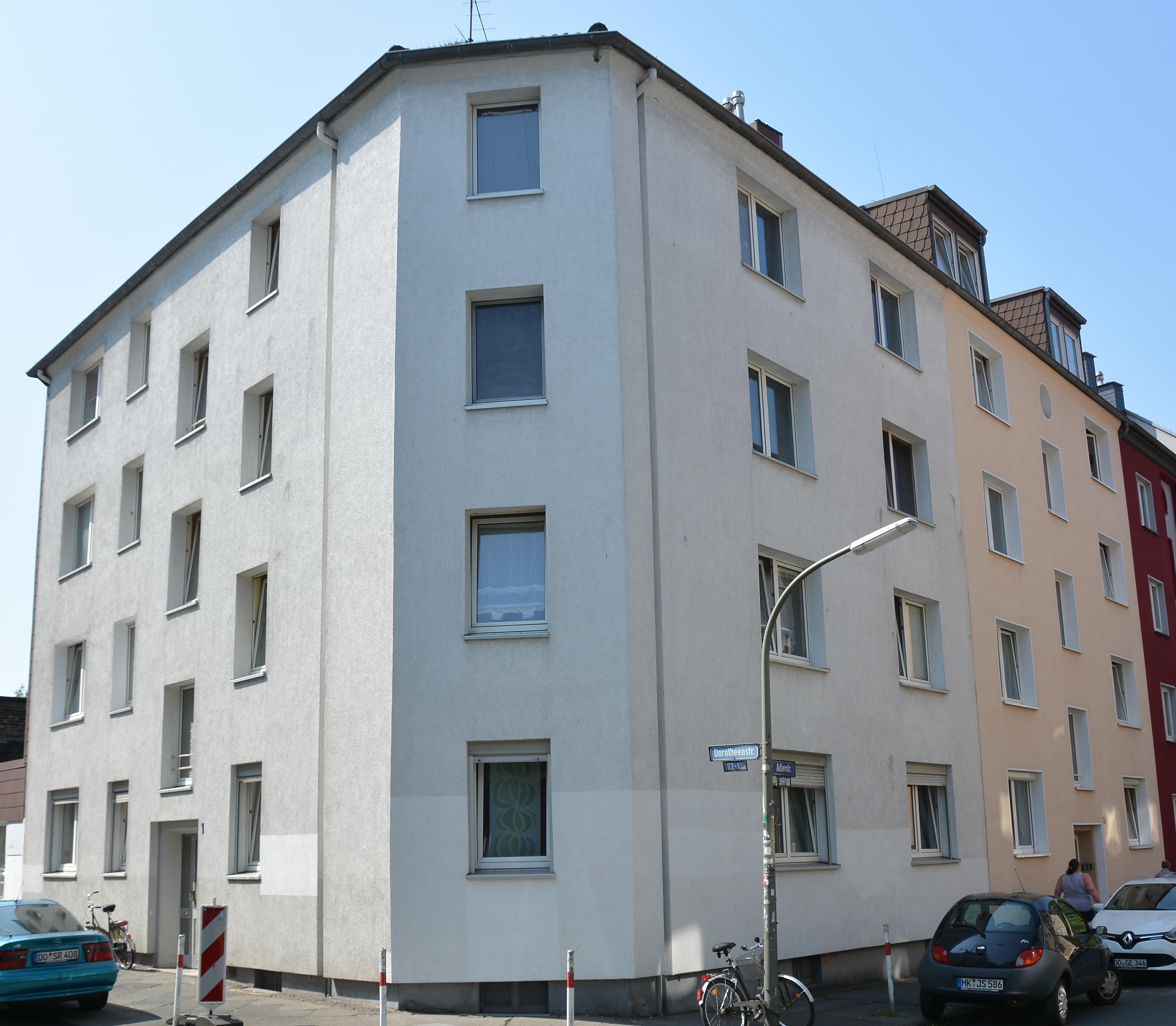 Wohnhaus eines Opfers des Naziterrors